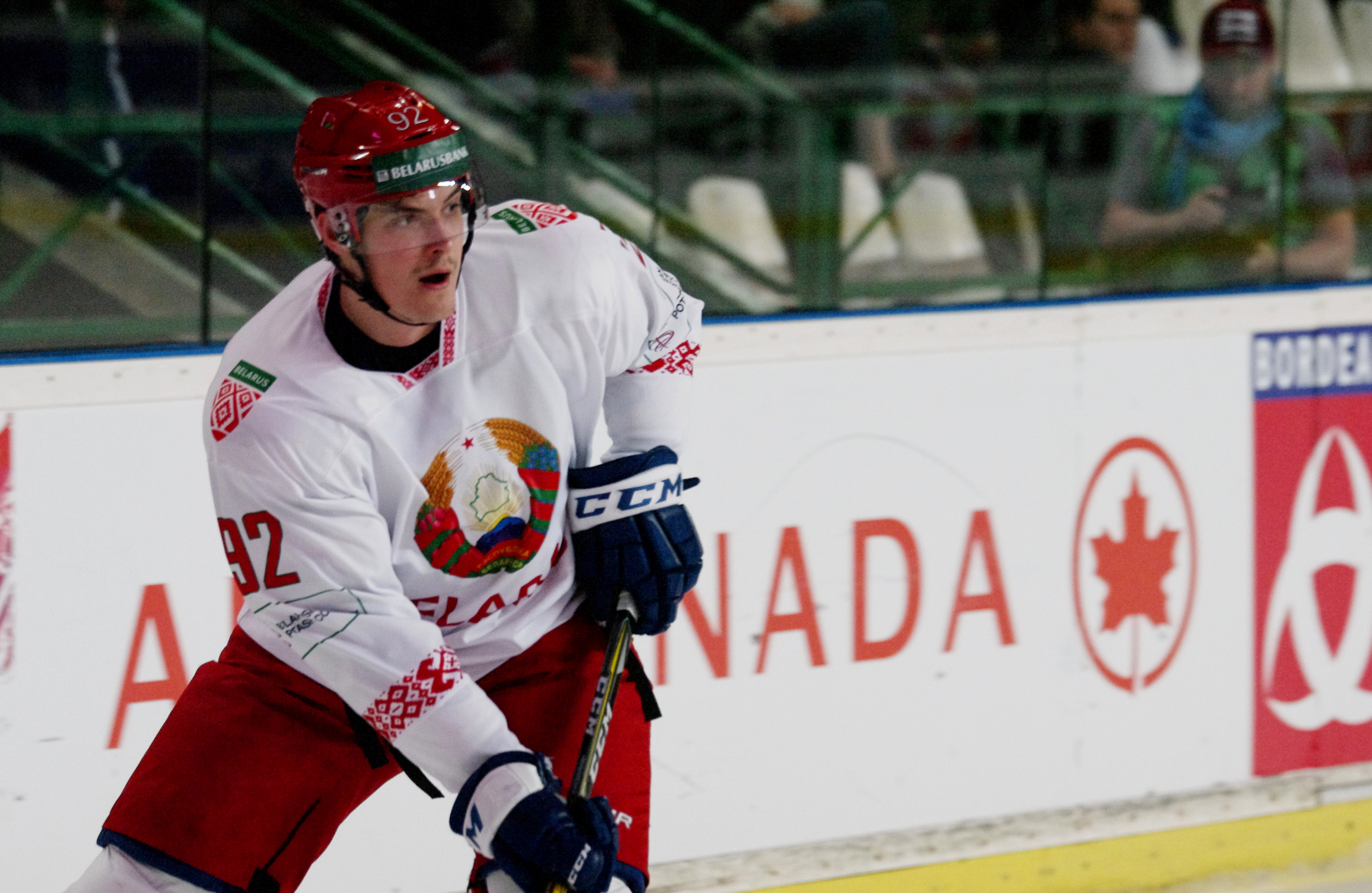 France vs. Biélorussie, 1er mai 2017